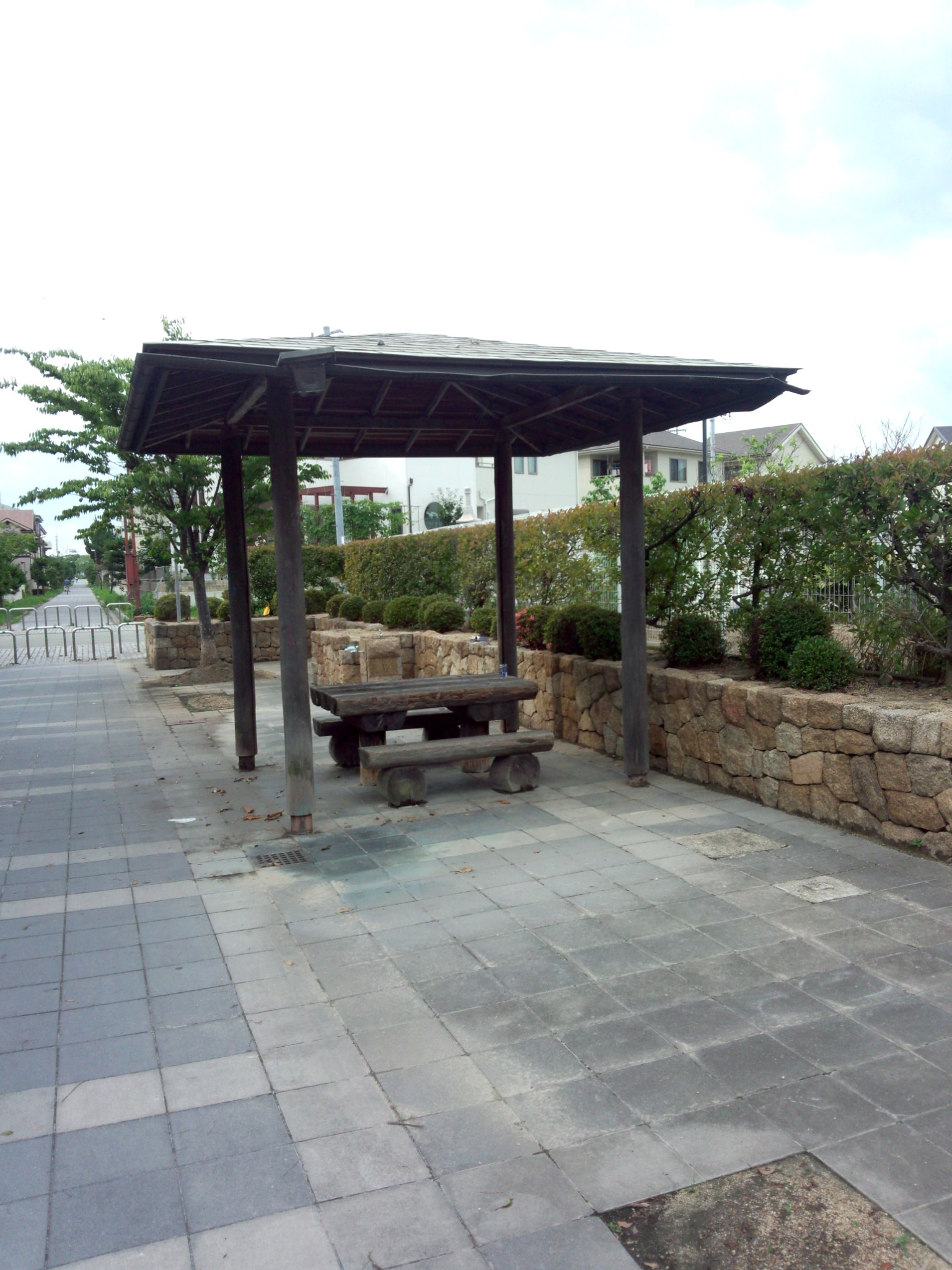 坂井駅（別府鉄道）